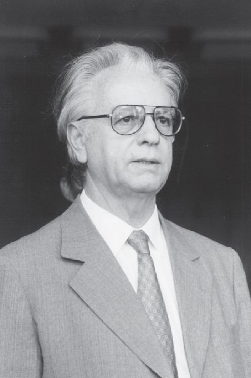 Itamar Augusto Cautiero Franco foi o 33º presidente do Brasil (1992-1995).